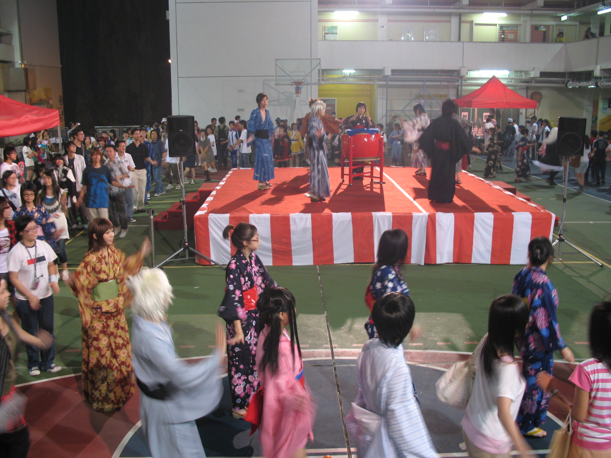 螢之祭2007夜祭中的盆踊環節